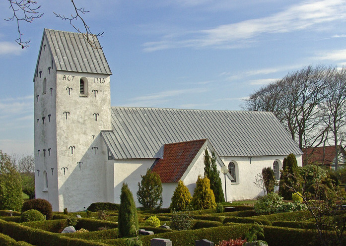 Hodde kirke (jylland) fra sydvest